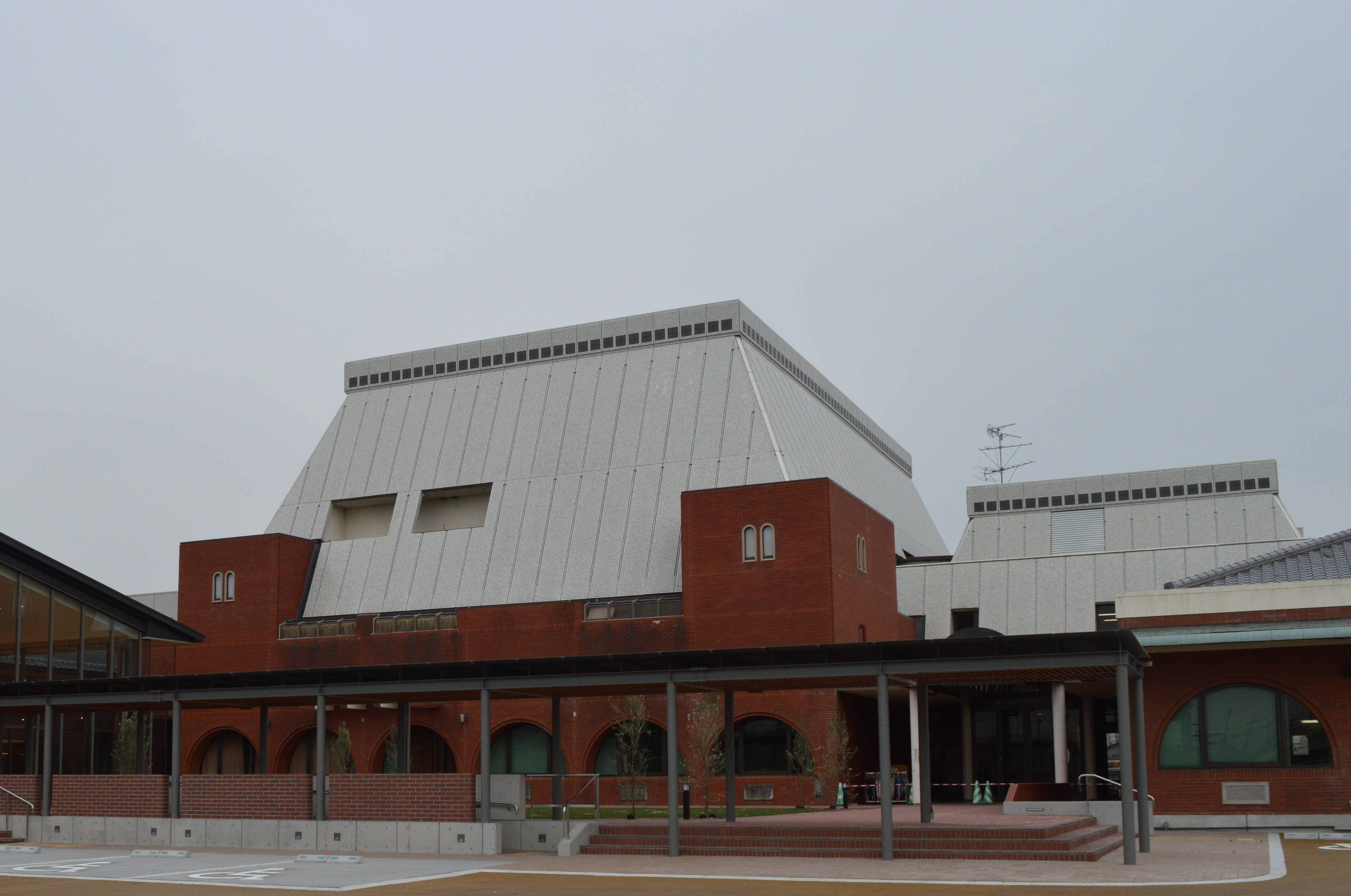 岡山県瀬戸内市の中央公民館。瀬戸内市立図書館やホールを内包。